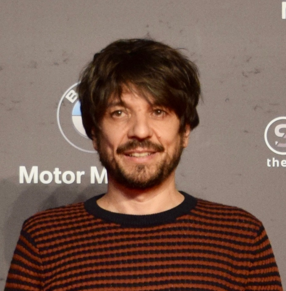 Festival de cinema de Sitges 2018